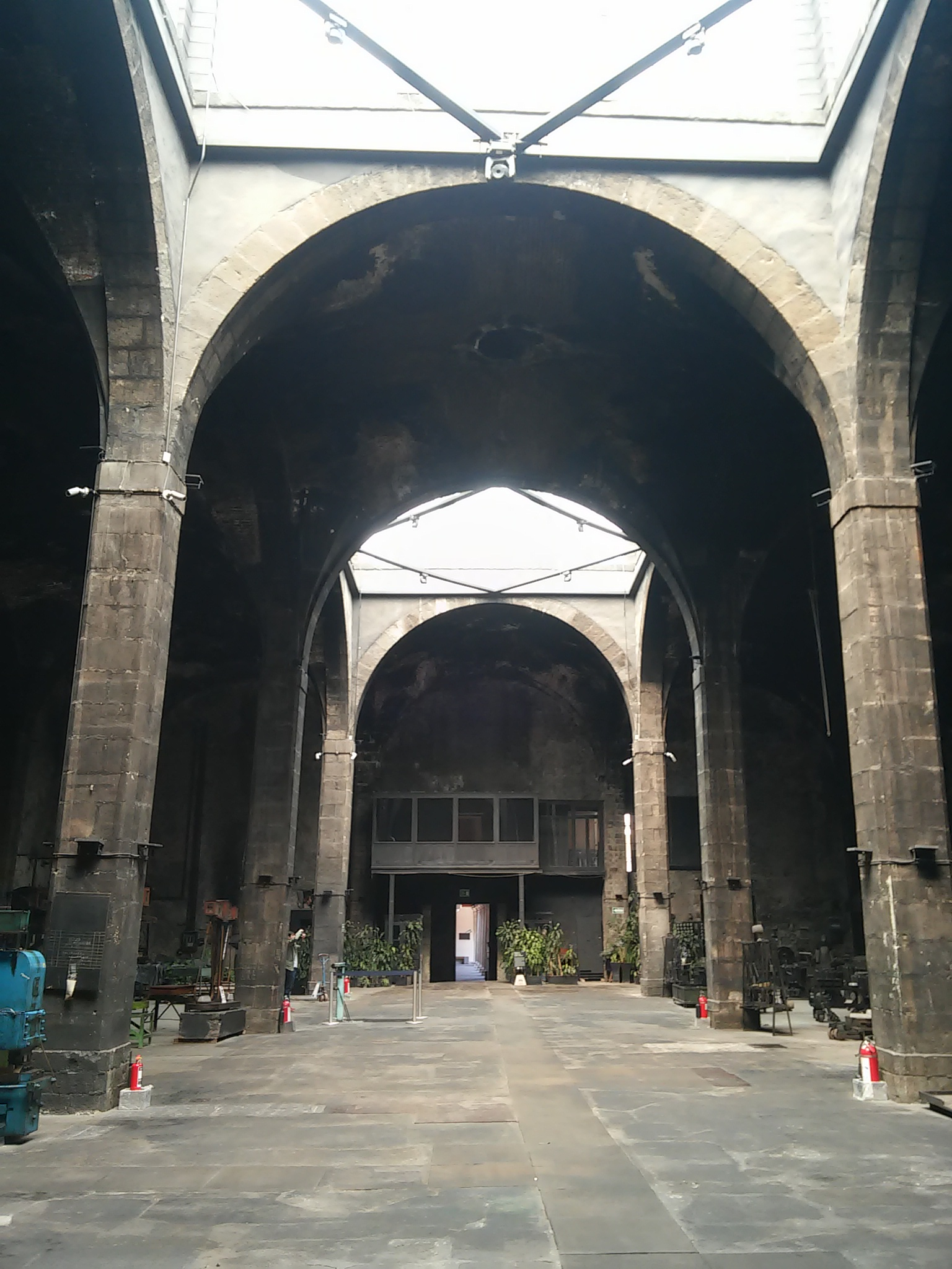 Sala de fundición de la casa del apartado, actual museo numismático nacional